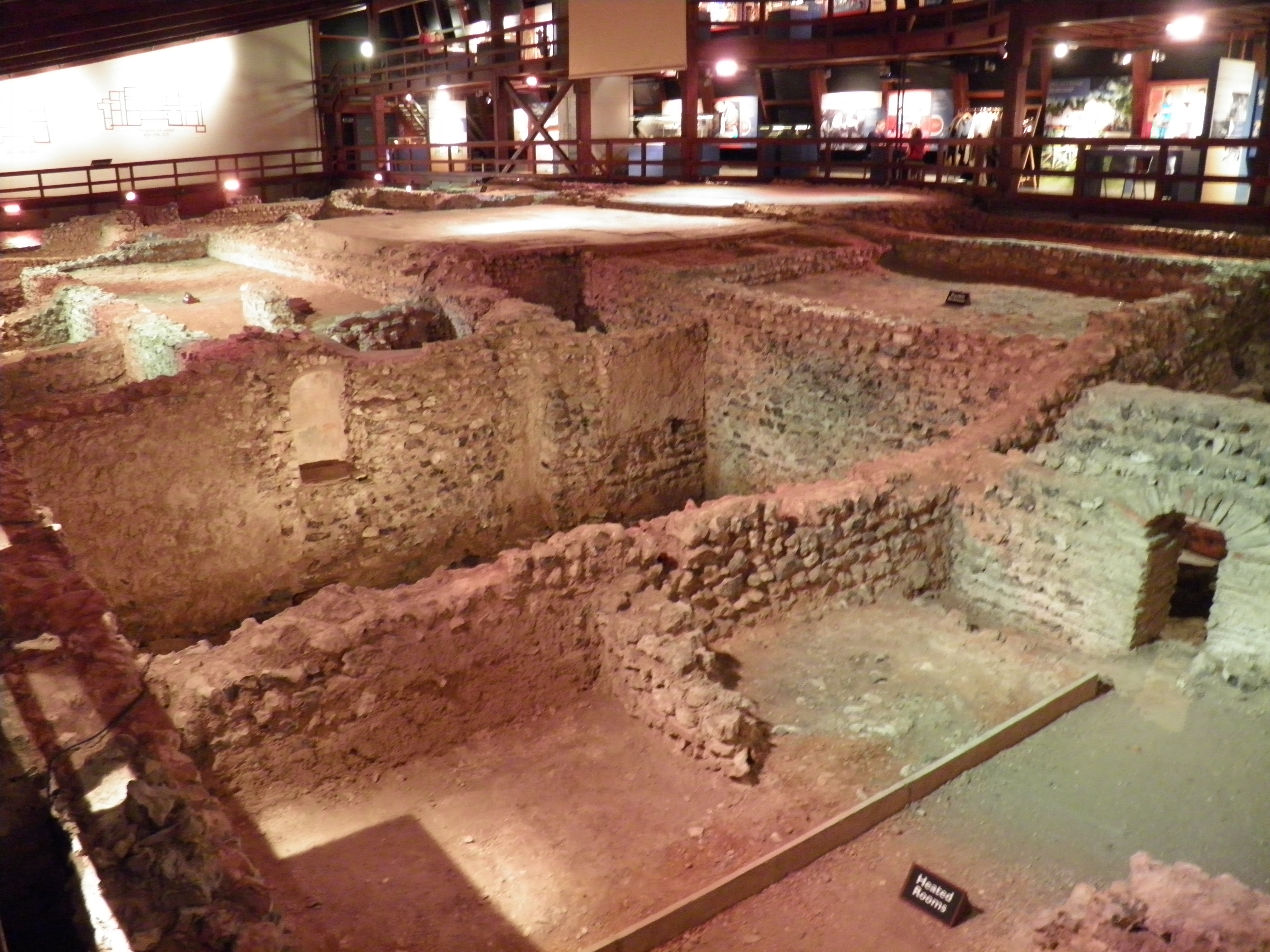 Lullingstone Roman Villa, Britannia (UK)